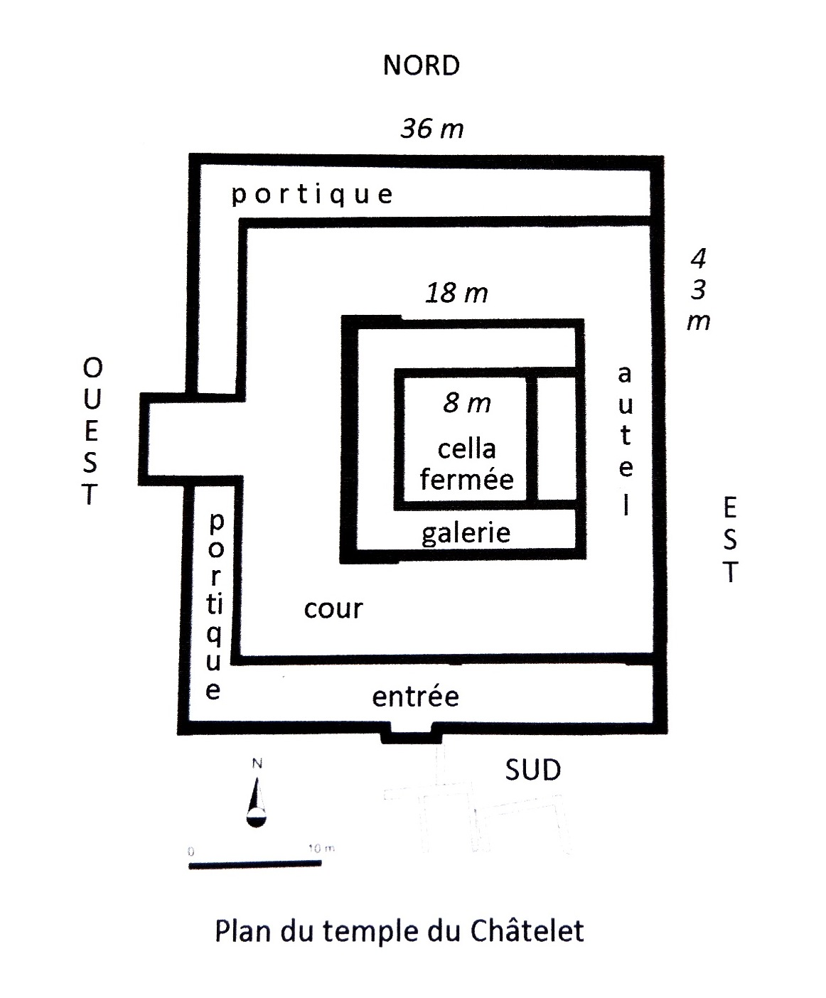 Saint-Désirat détail